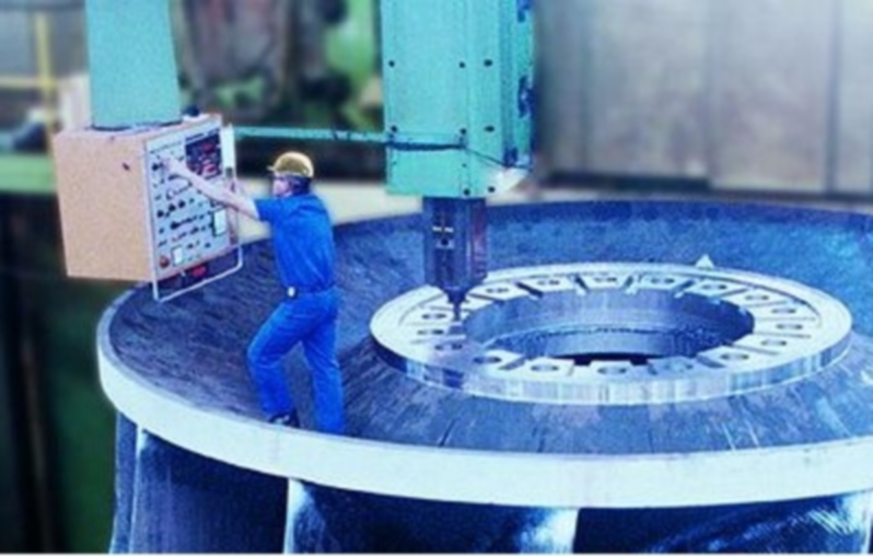 Partie pointage-perçage d'une turbine sur tour vertical